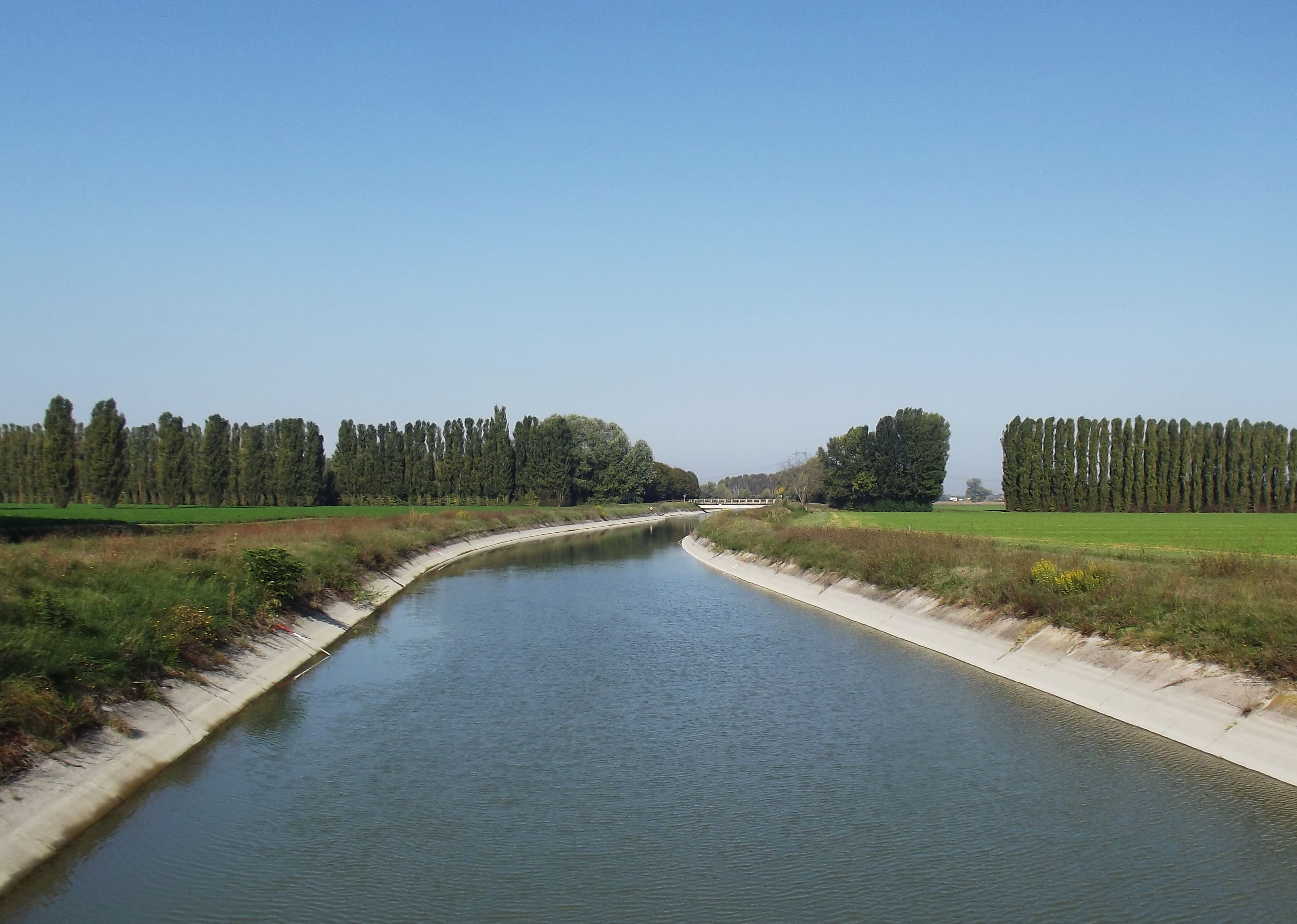 Canale per l' approvvigionamento idrico di oltre 3000 Kmq della Pianura Padana, Italia